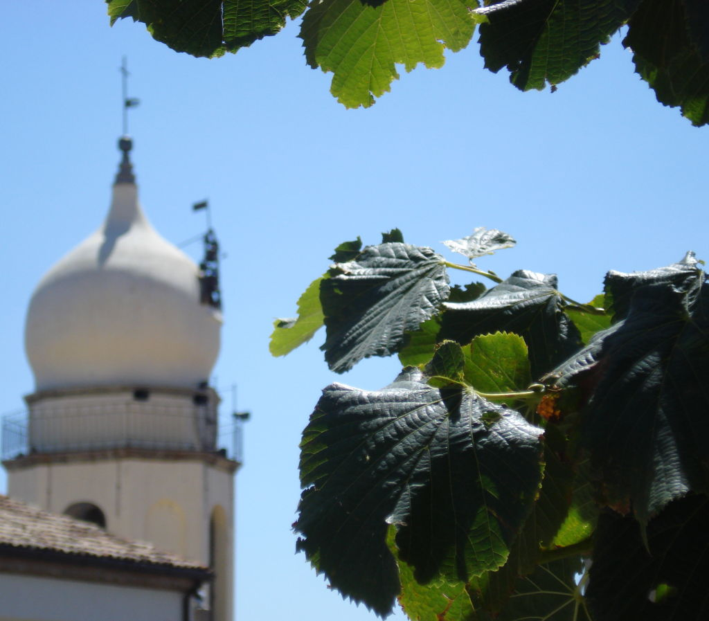 Cupola Chiesa Madre di S. Maria Assunta vista da Piazza Plebiscito